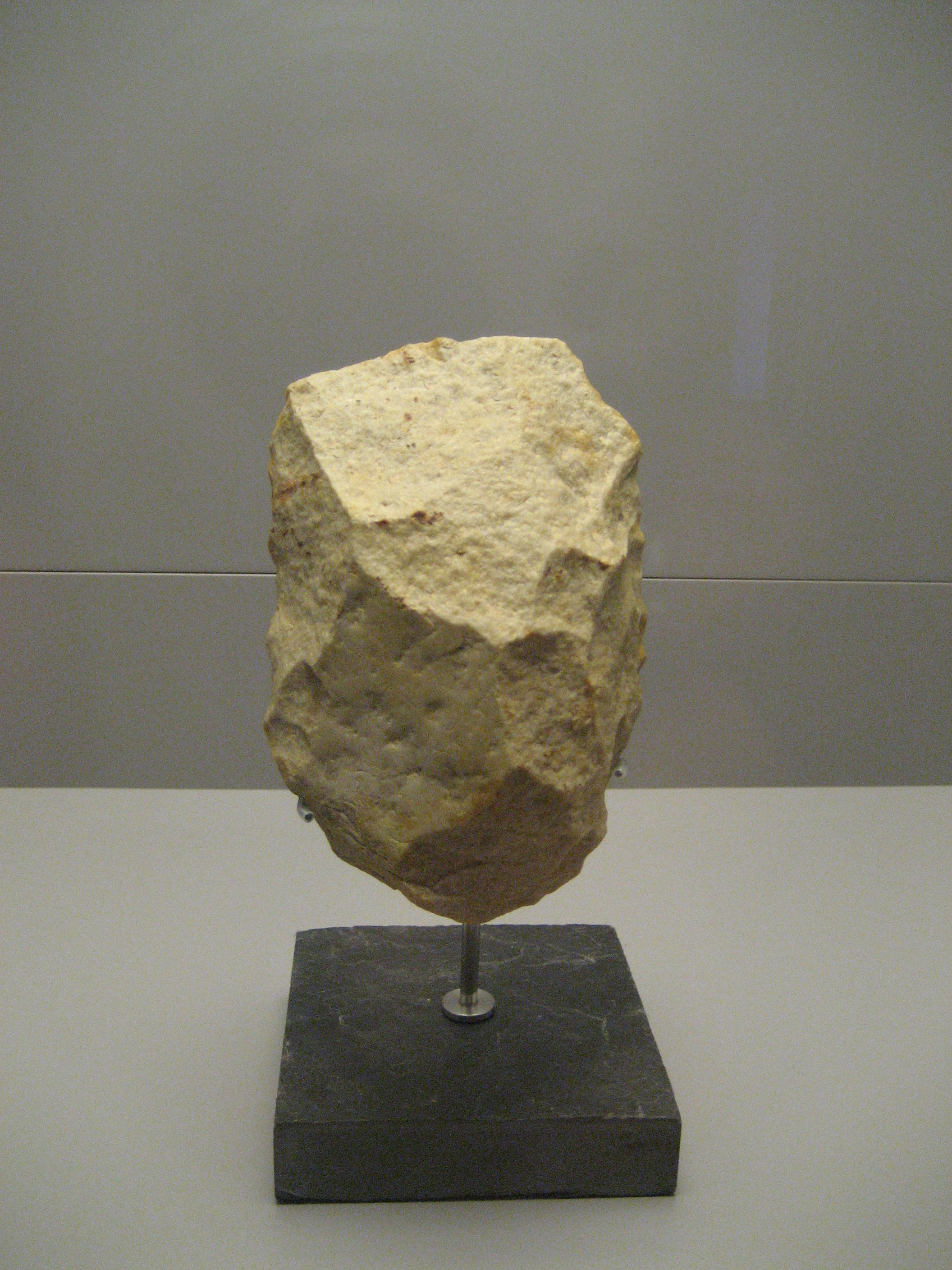 Hendedor hallado en El Bierzo, León, España.